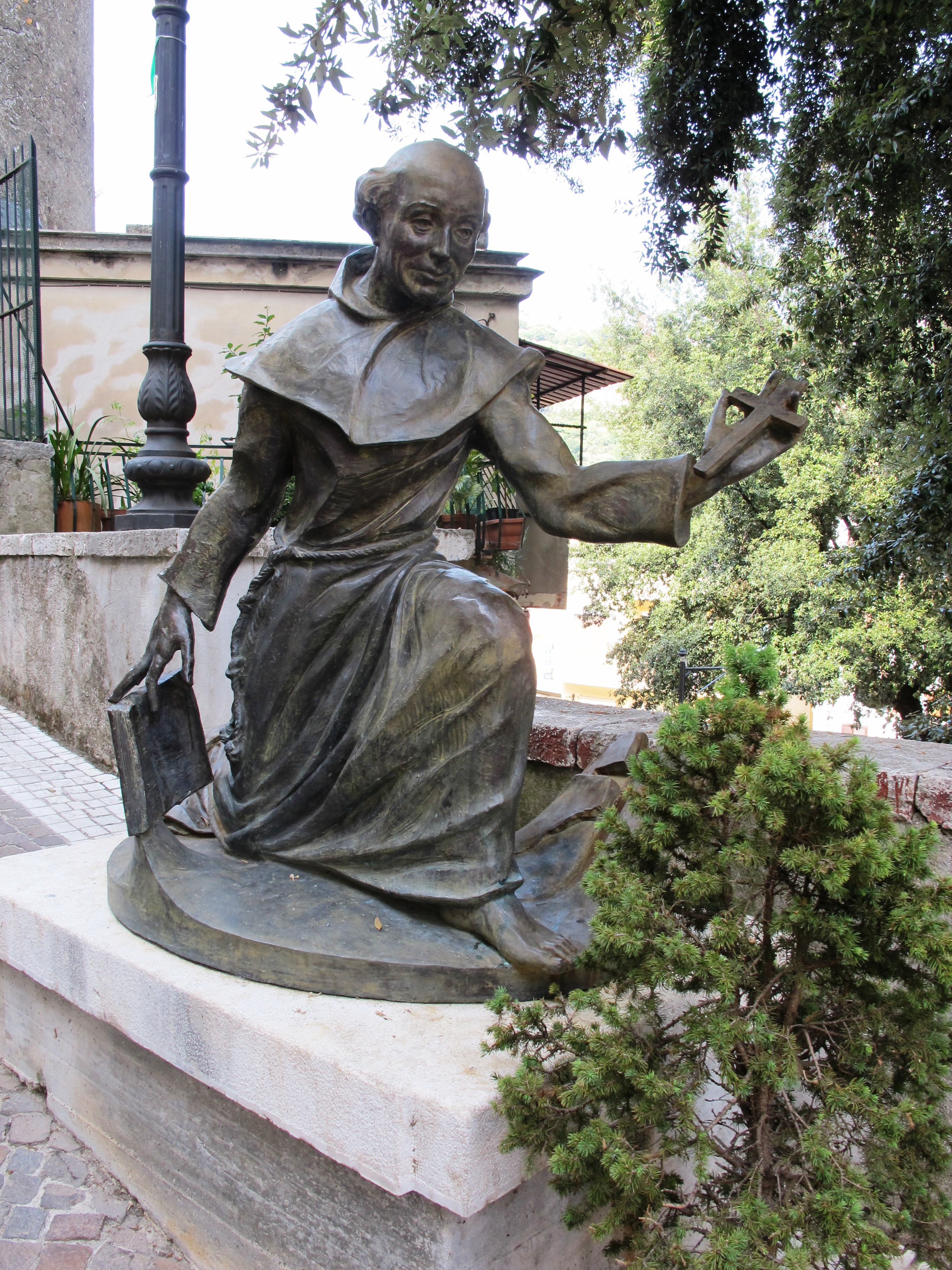 Il Santo